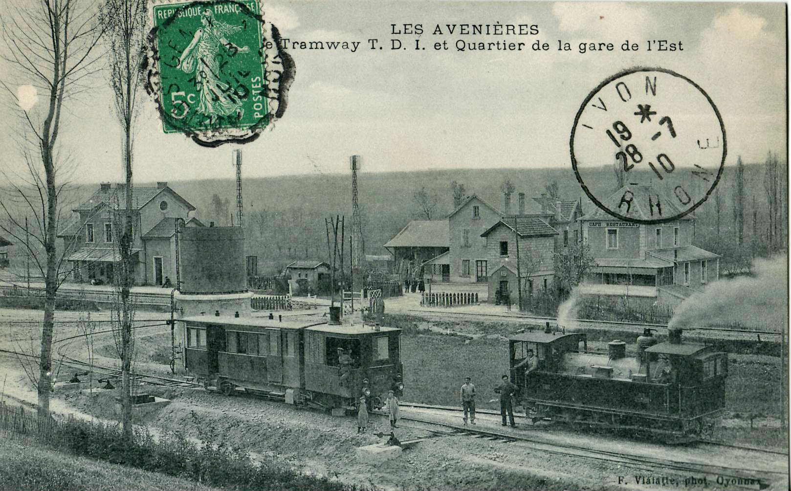 Carte postale ancienne éditée par F. Vialatte à Oyonax : LES AVENIERES - Le tramway TDI et le quartier de la gare de l'Est. Vue au premier plan du dépôt des TDI, avec la locomotive 22 tonnes n°18 (future n°34 ?), et une des deux automotrices à vapeur Buffaud & Robatel/La Buire du réseau. A gauche du cliché, la Gare du CFEL